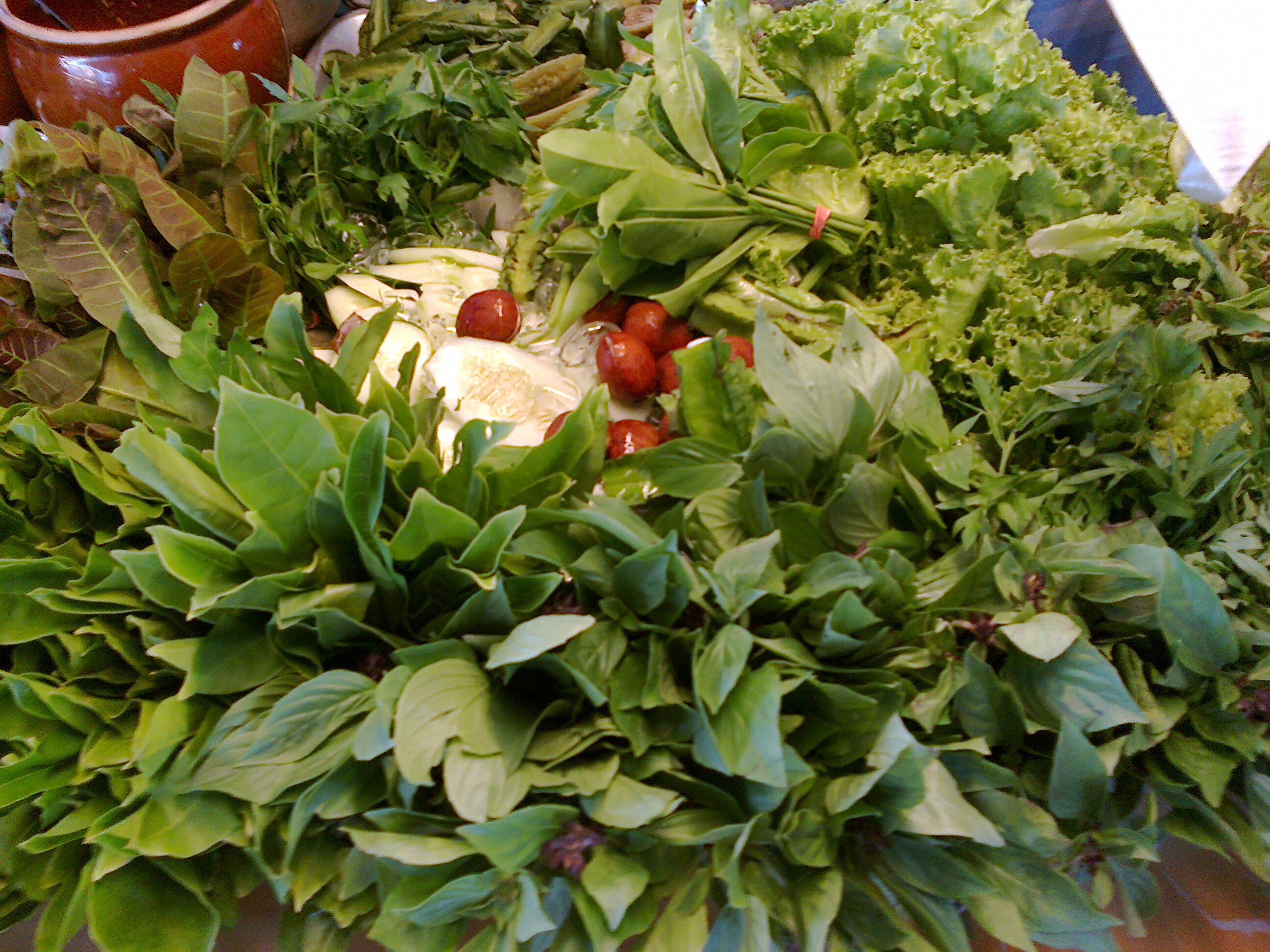 Pelbagai jenis ulam.